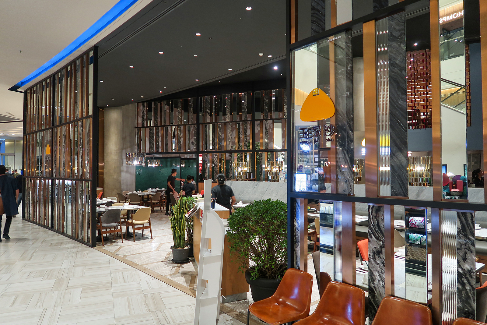 Wang Jia Sha in Siam Paragon